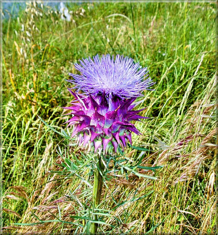 Alcachofra